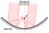 La présence d'un objet devant le miroir, comme par exemple un capteur ou un autre miroir, ne gêne pas la focalisation mais diminue simplement l'intensité collectée. Auteur : Christophe Dang Ngoc Chan, réalisé avec un programme de dessin vectoriel Licence GFDL Christophe Dang Ngoc Chan